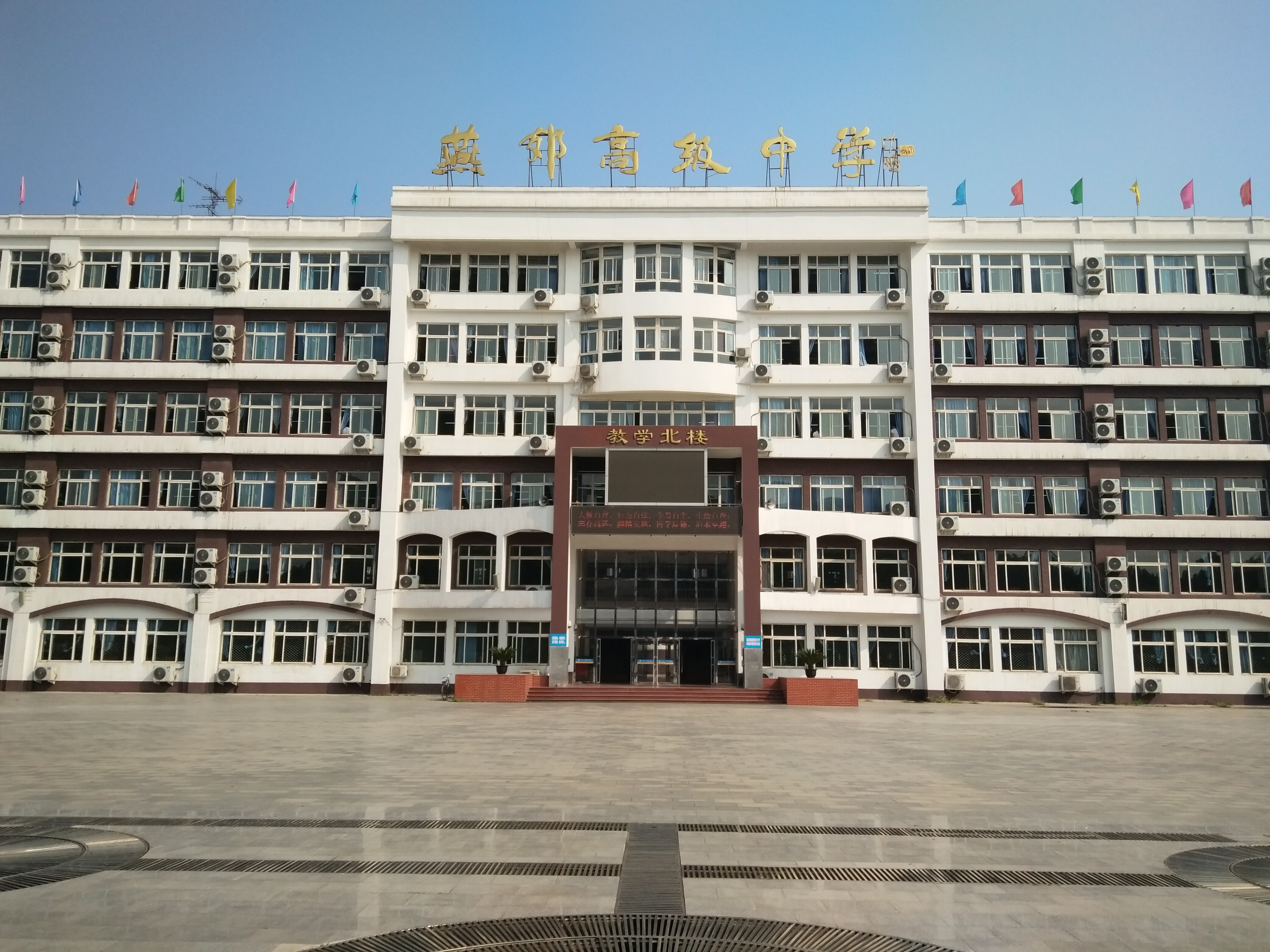 中文（中国大陆）: 三河市第二中学教学北楼